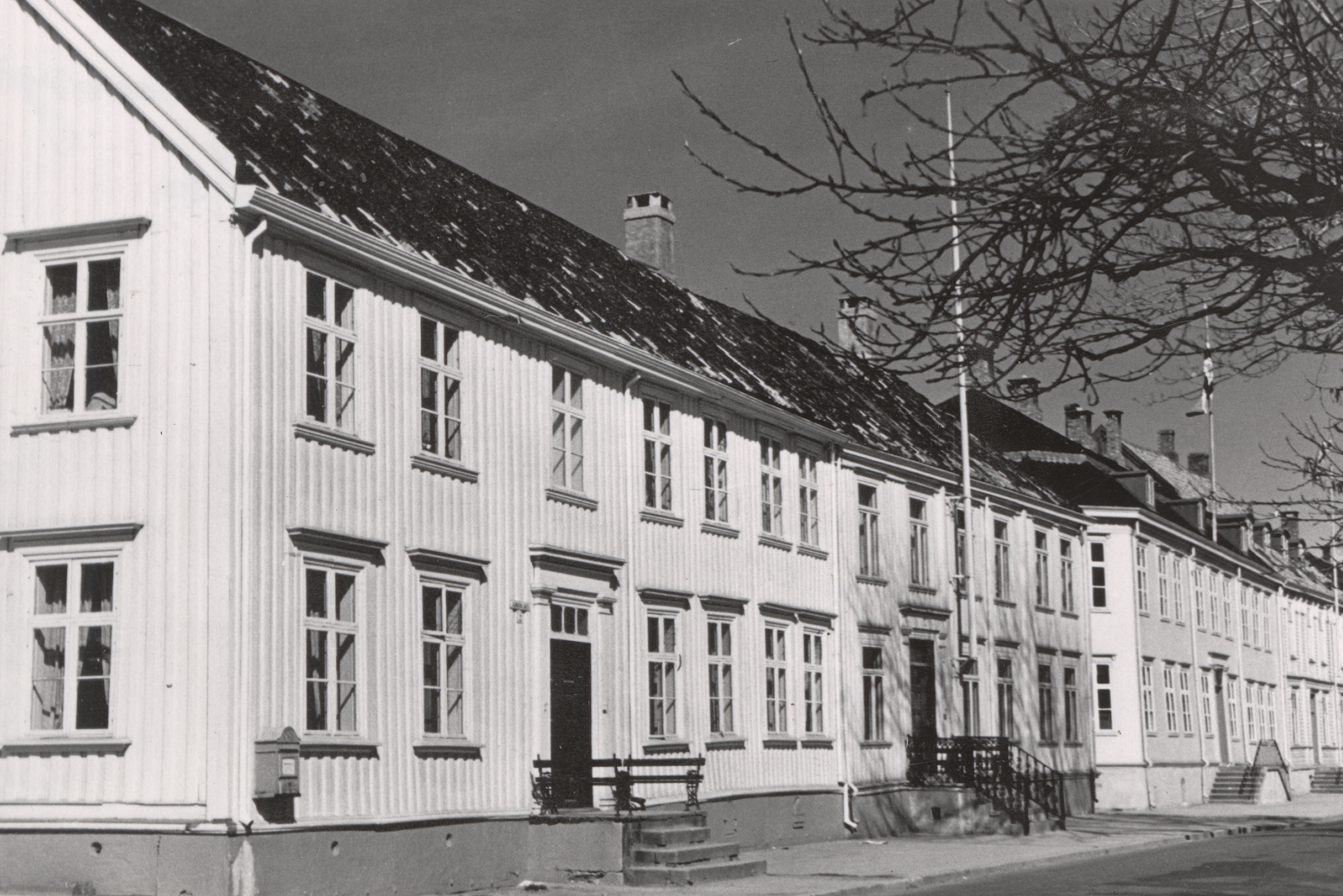 Det gamle Rådhus - Trondheim Folkebibliotek i Trondheim, Sør-Trøndelag Viser Kjøpmannsgaten 20 - Lorckgården. Gården inngår nå som en del av Trondheim Folkebibliotek